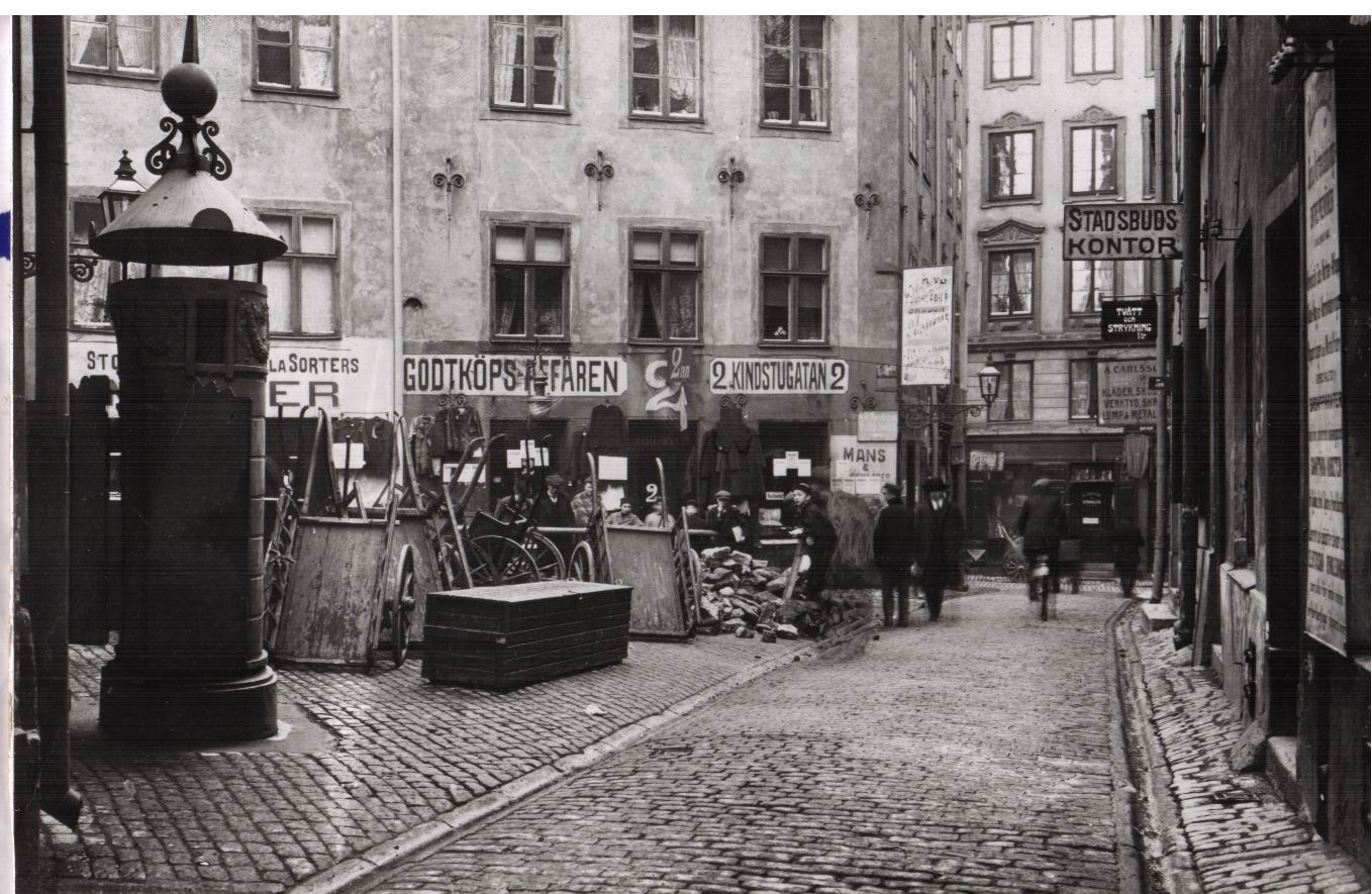 Törneska huset sett från Brända tomten vid förra sekelskiftet.